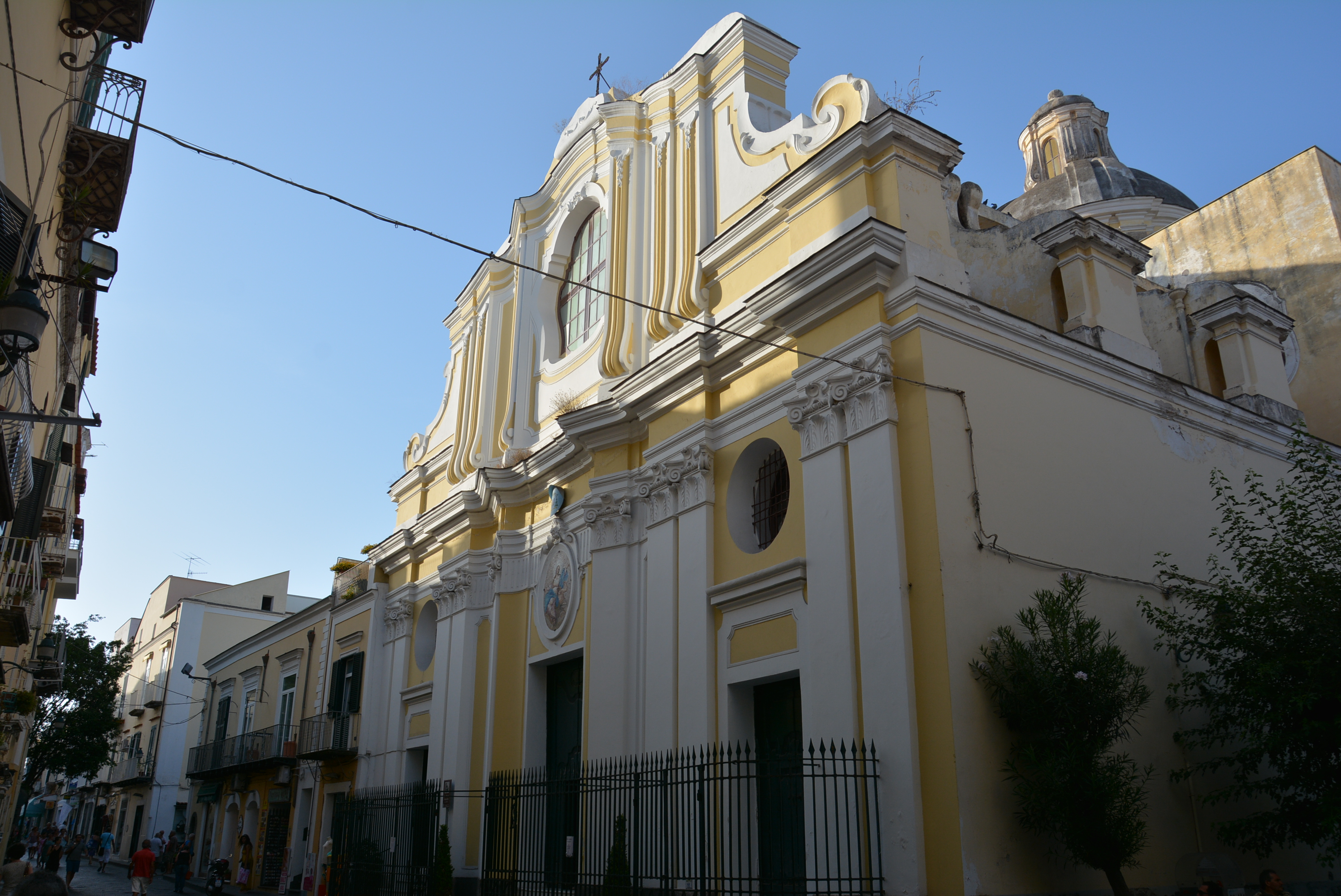 Cattedrale di Santa Maria Assunta a Ischia